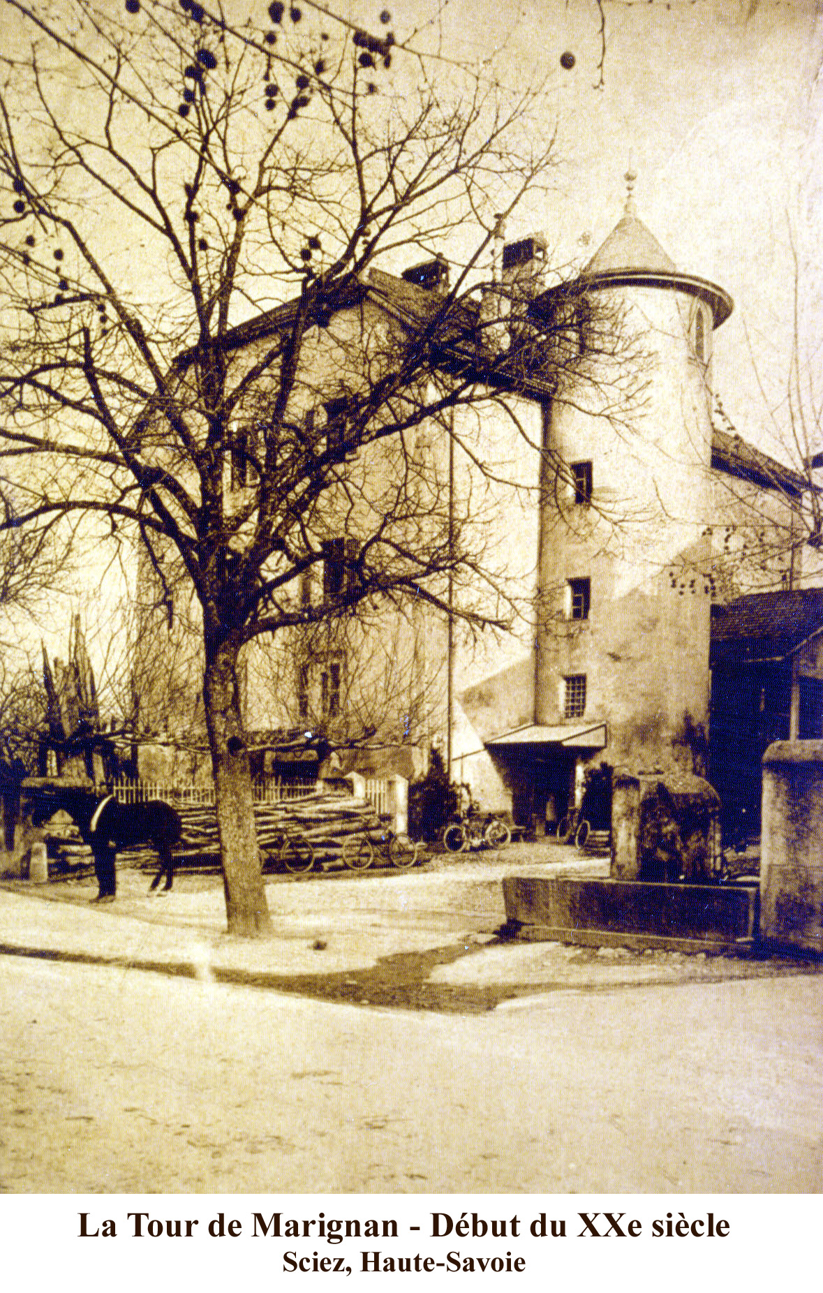 Photo de la Tour de Marignan, commune de Sciez, Haute-Savoie, France. Début XXe siècle.